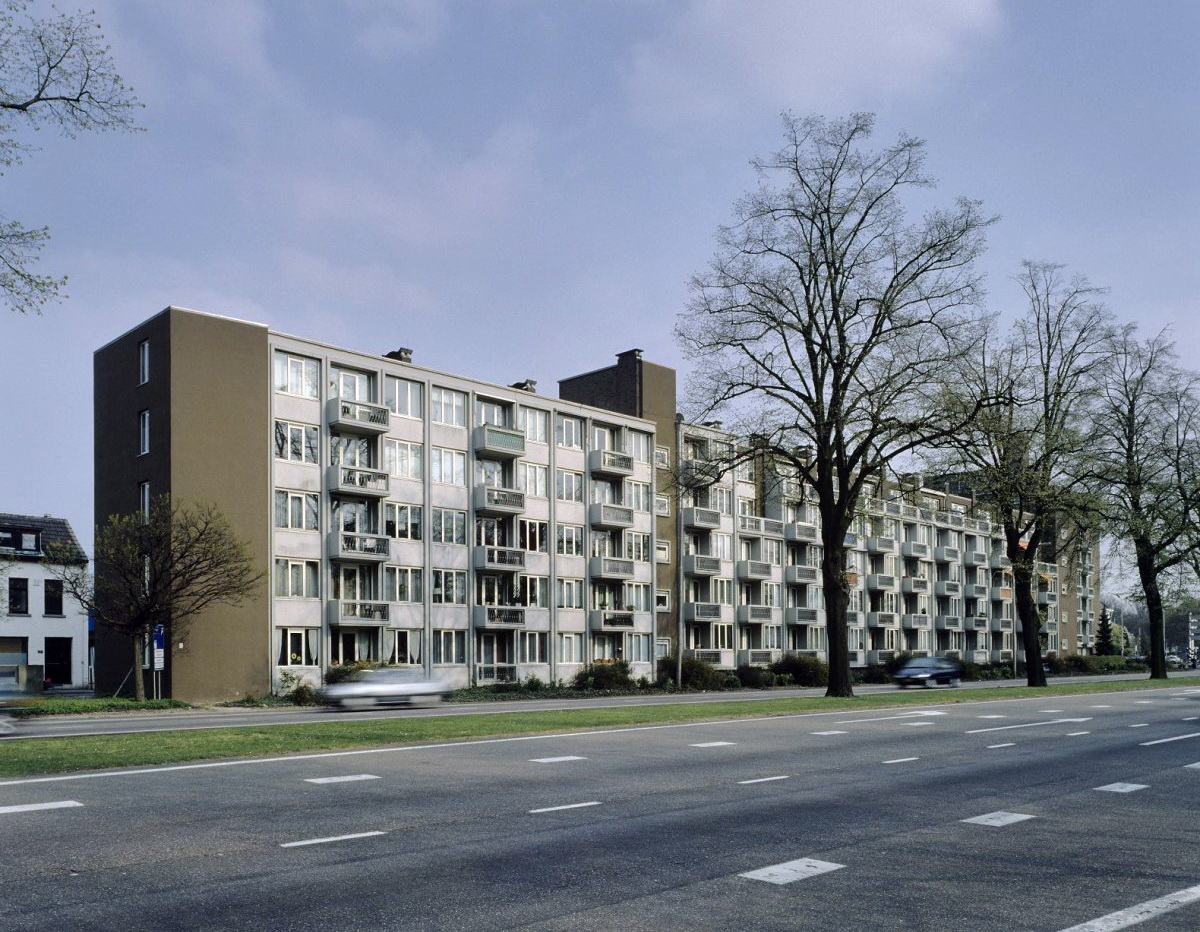 Gemeenteflat: Overzicht (opmerking: Gefotografeerd voor Monumenten van Herrezen Nederland)